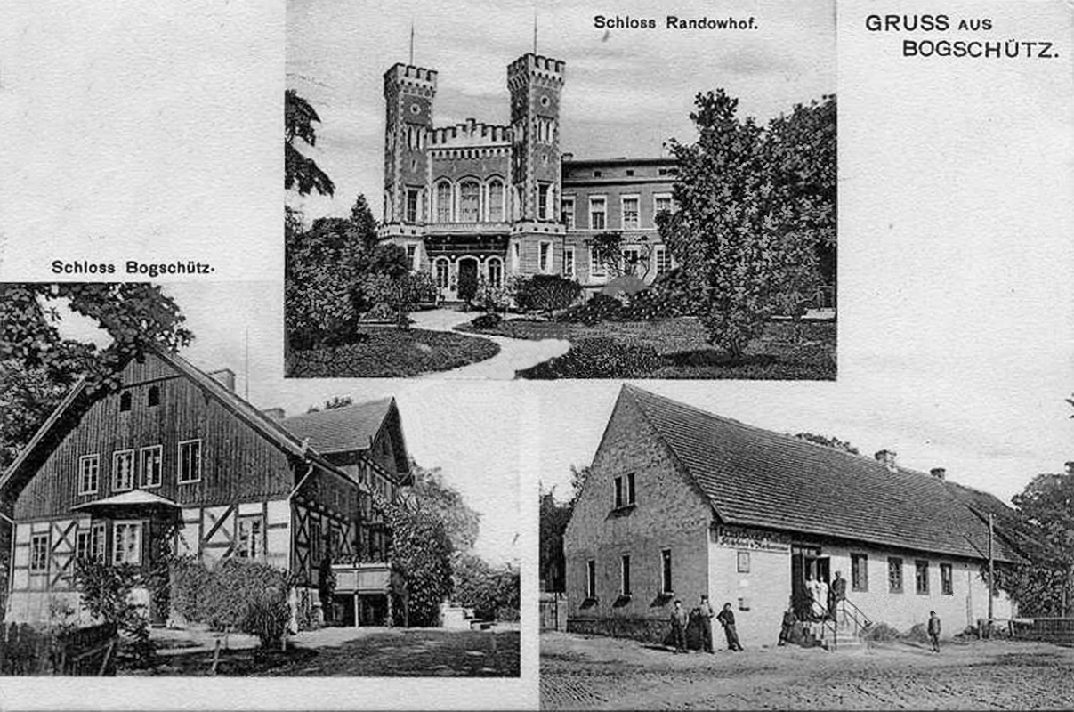 Postkarte aus Boguszyce (Bogschütz) zu Beginn des 20. Jahrhunderts. Schloss Randowhof.